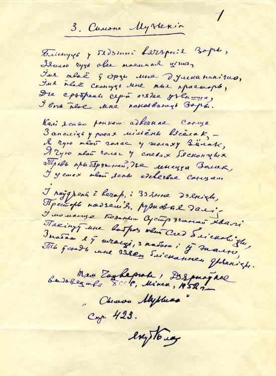 Аўтограф Сымона-музыкі